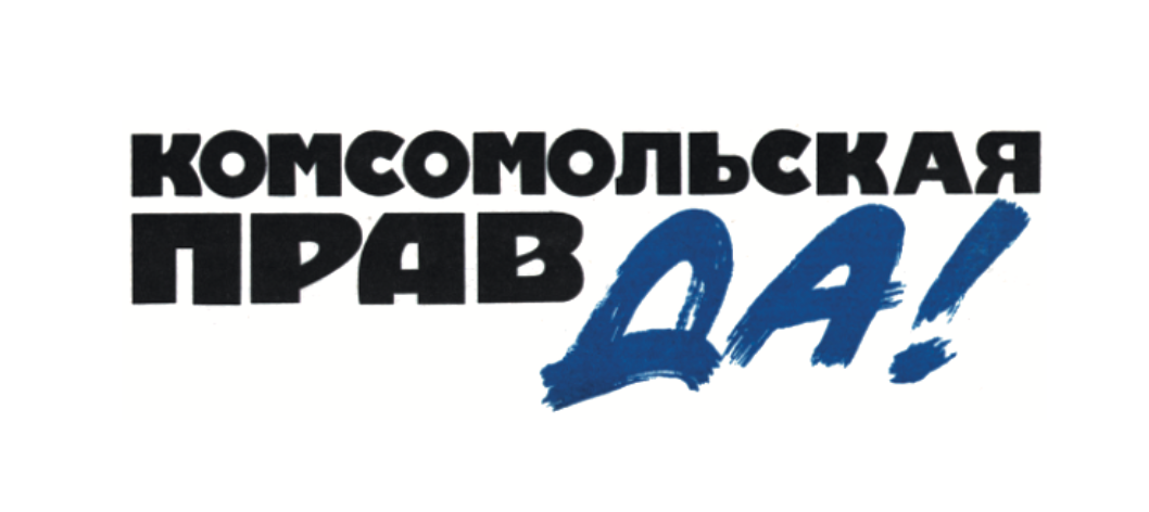 Газета КОМСОМОЛЬСКАЯ ПРАВДА. 1995 г